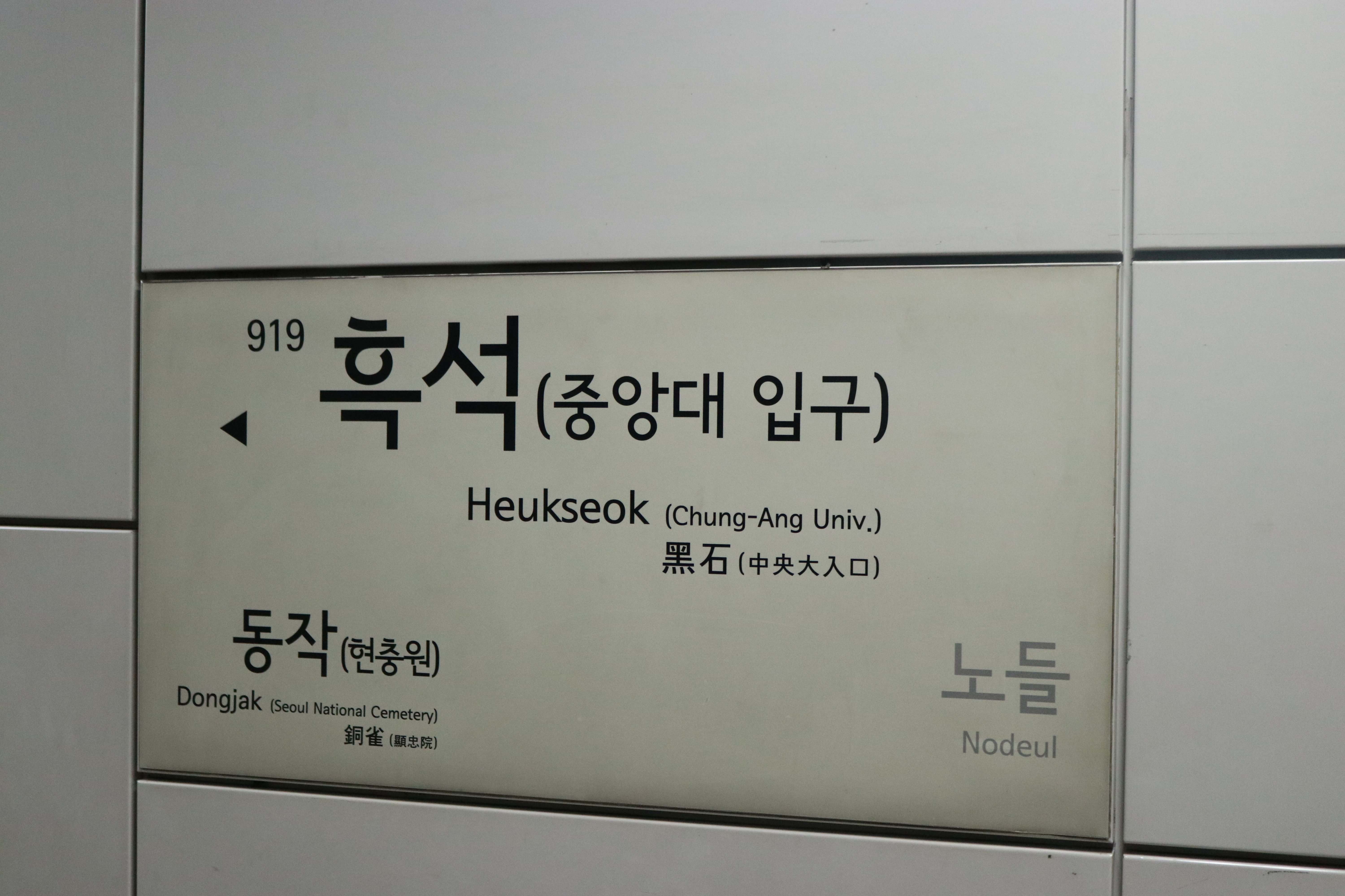 흑석역 역명판